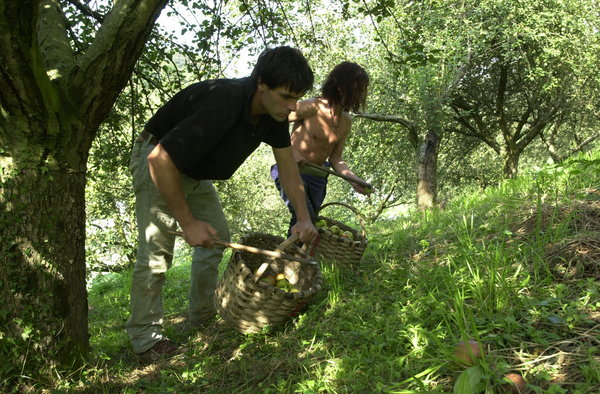 Sagarren bilketa.